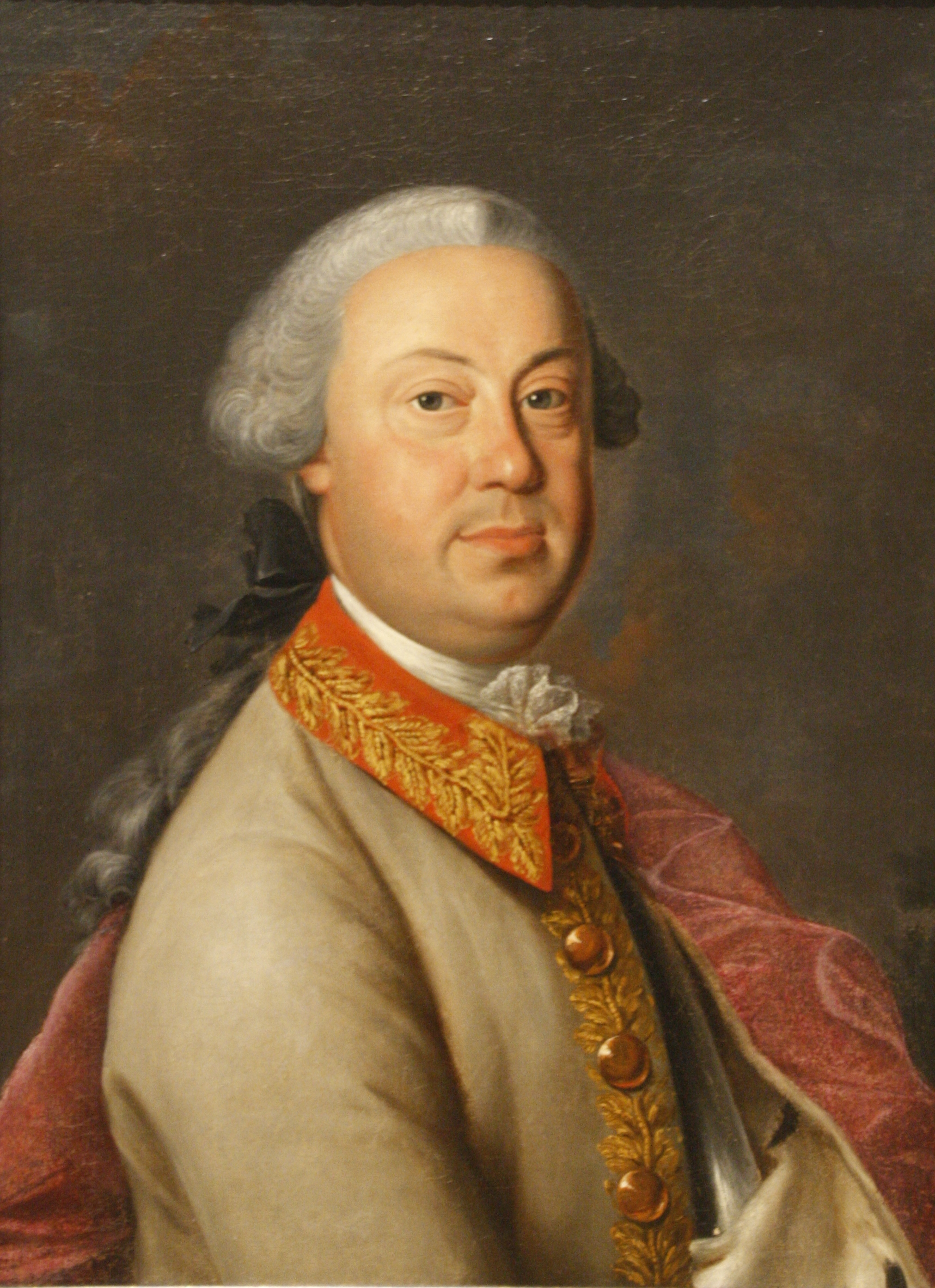 Князь Алексей Никитич Волконский